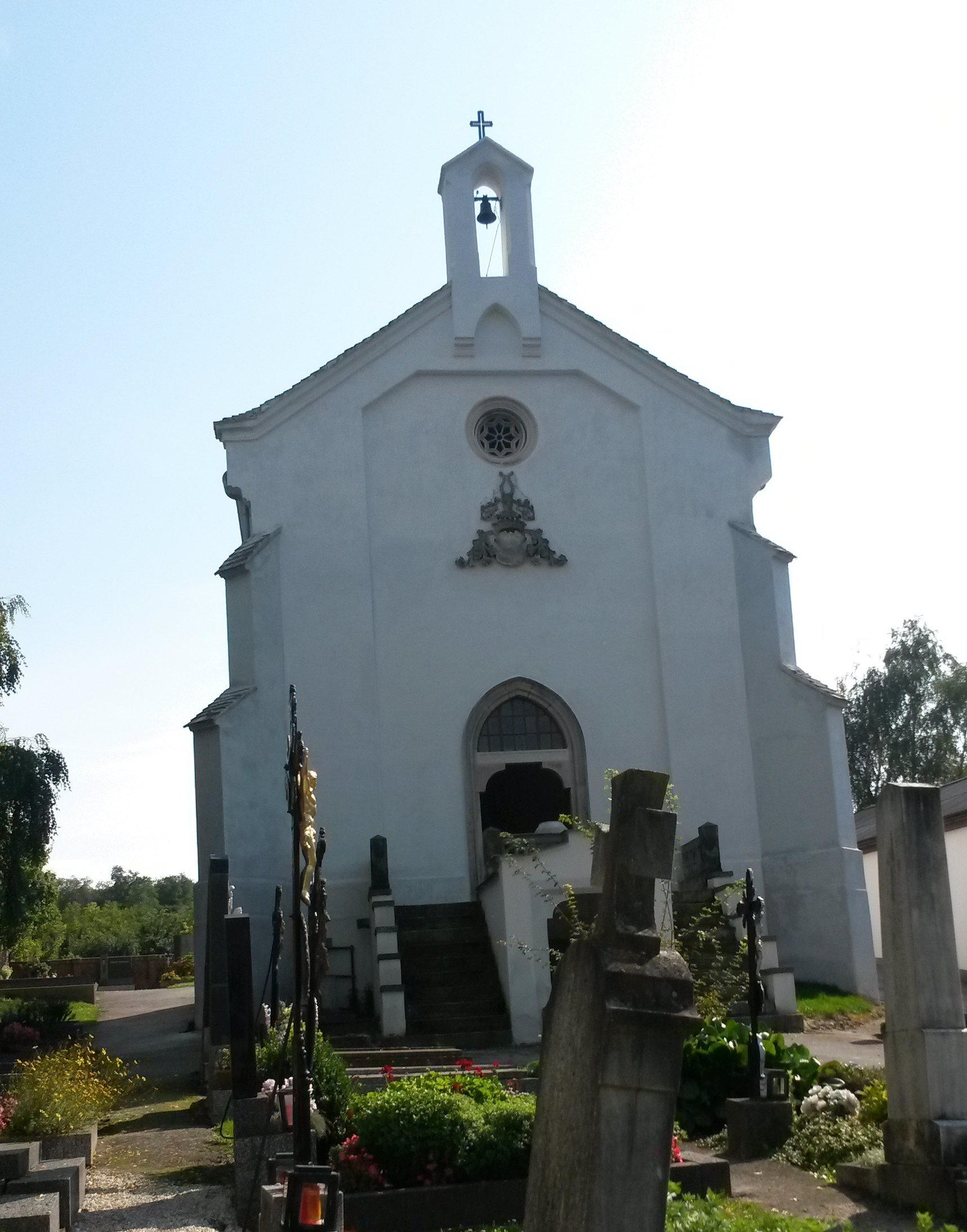 Fassade nach der Renovierung Sommer 2014